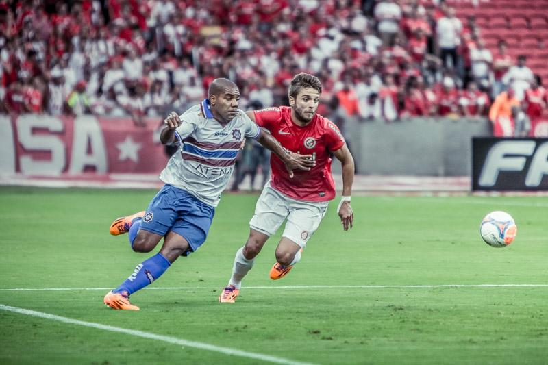 O jogador de futebol brasileiro Cláudio Winck (em março/2014 no S.C. Internacional, de Porto Alegre) em ação.